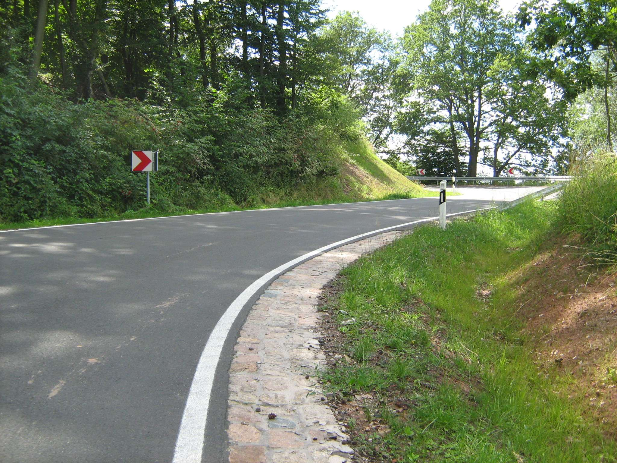 Straße von Hundeshagen Richtung Leinefelde, Kurve kurz am oberen Ende der Serpentinenstrecke